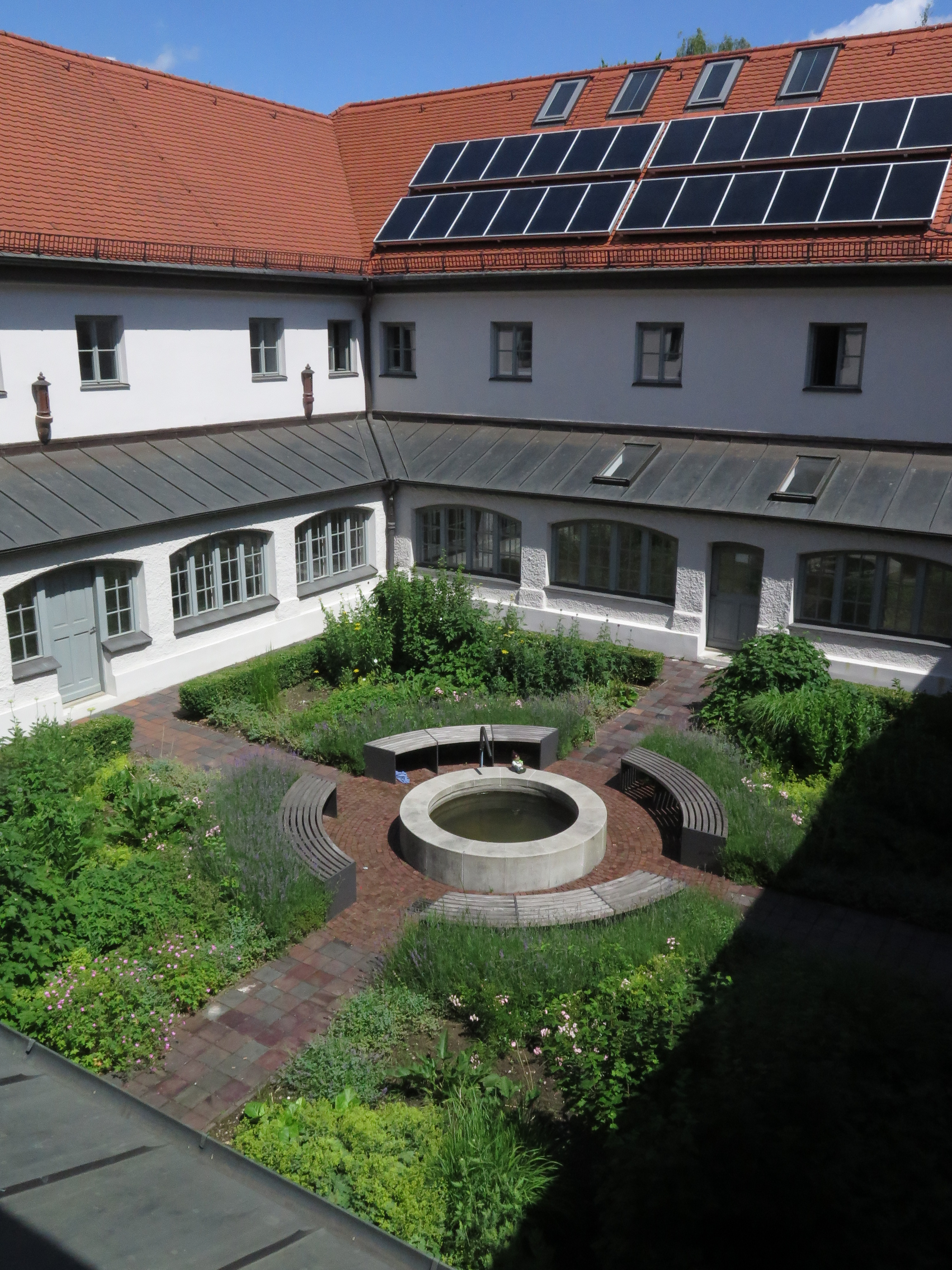 Innenhof der Journalistenschule